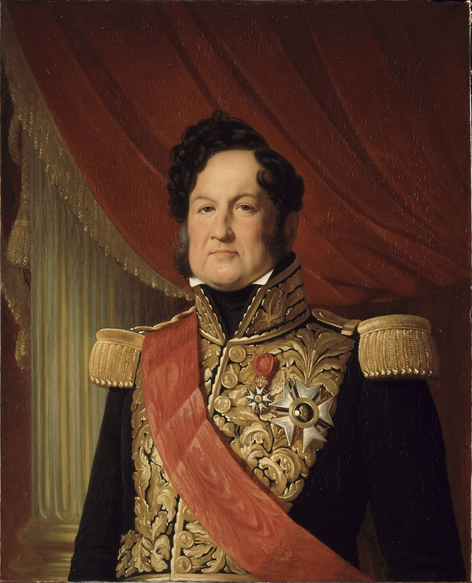 Portrait du roi Louis Philippe, 1838